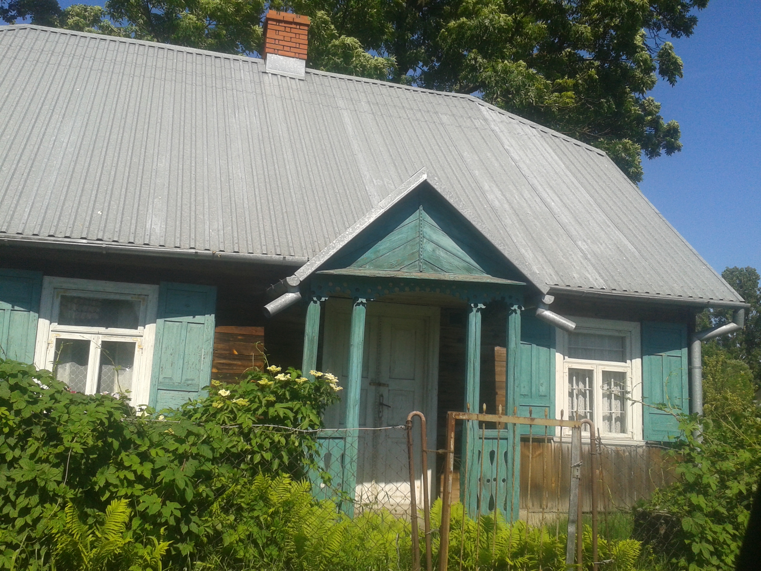 Dom drewniany w centrum Ortela Królewskiego